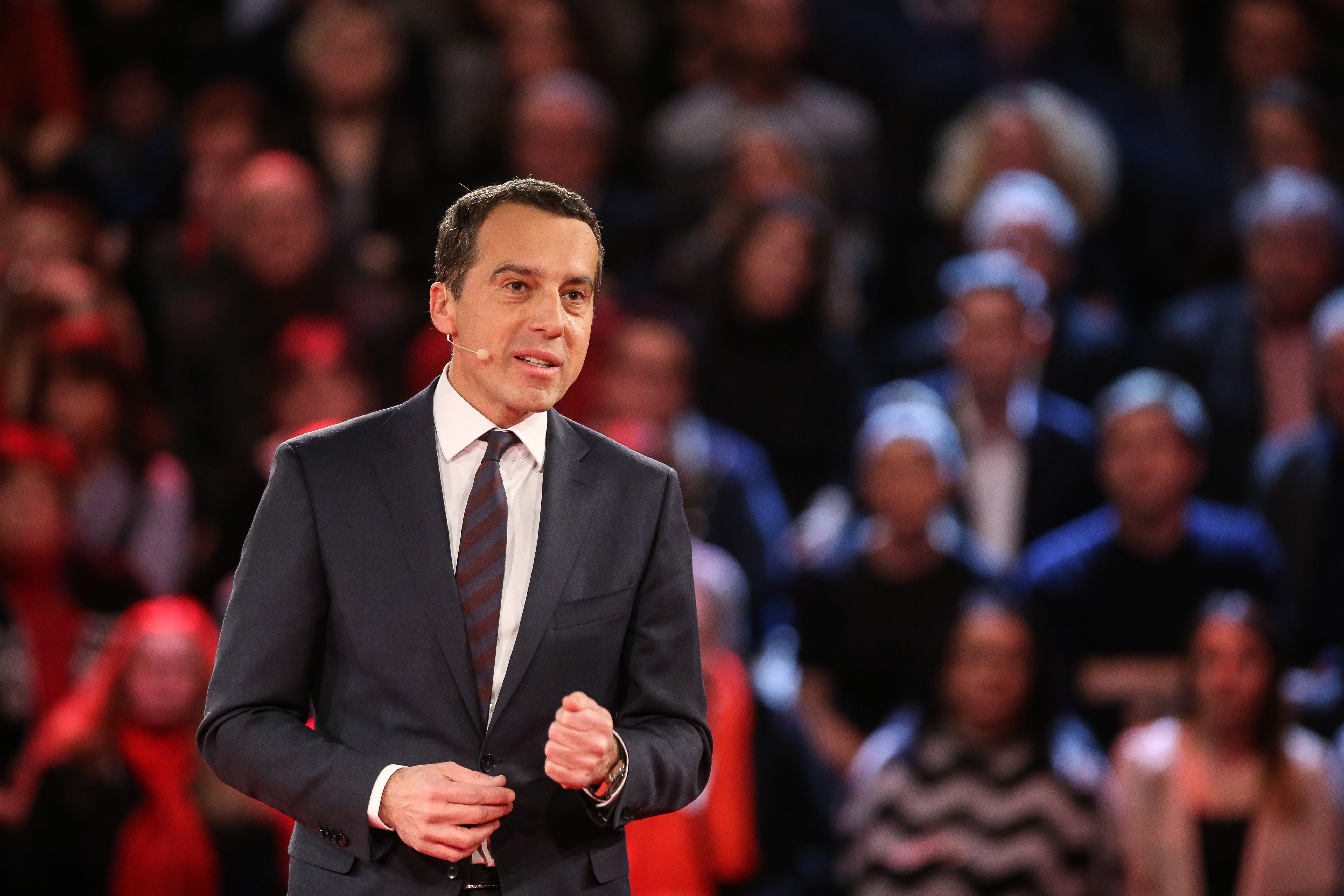 Christian Kern bei seiner Grundsatzrede und Vorstellung des Programms "Plan A" in Wels